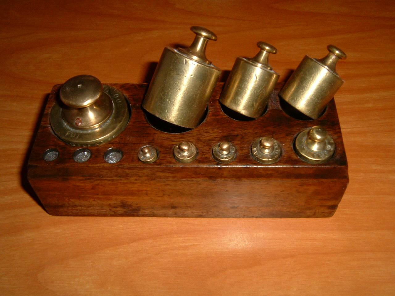 Série de poids cylindriques laiton